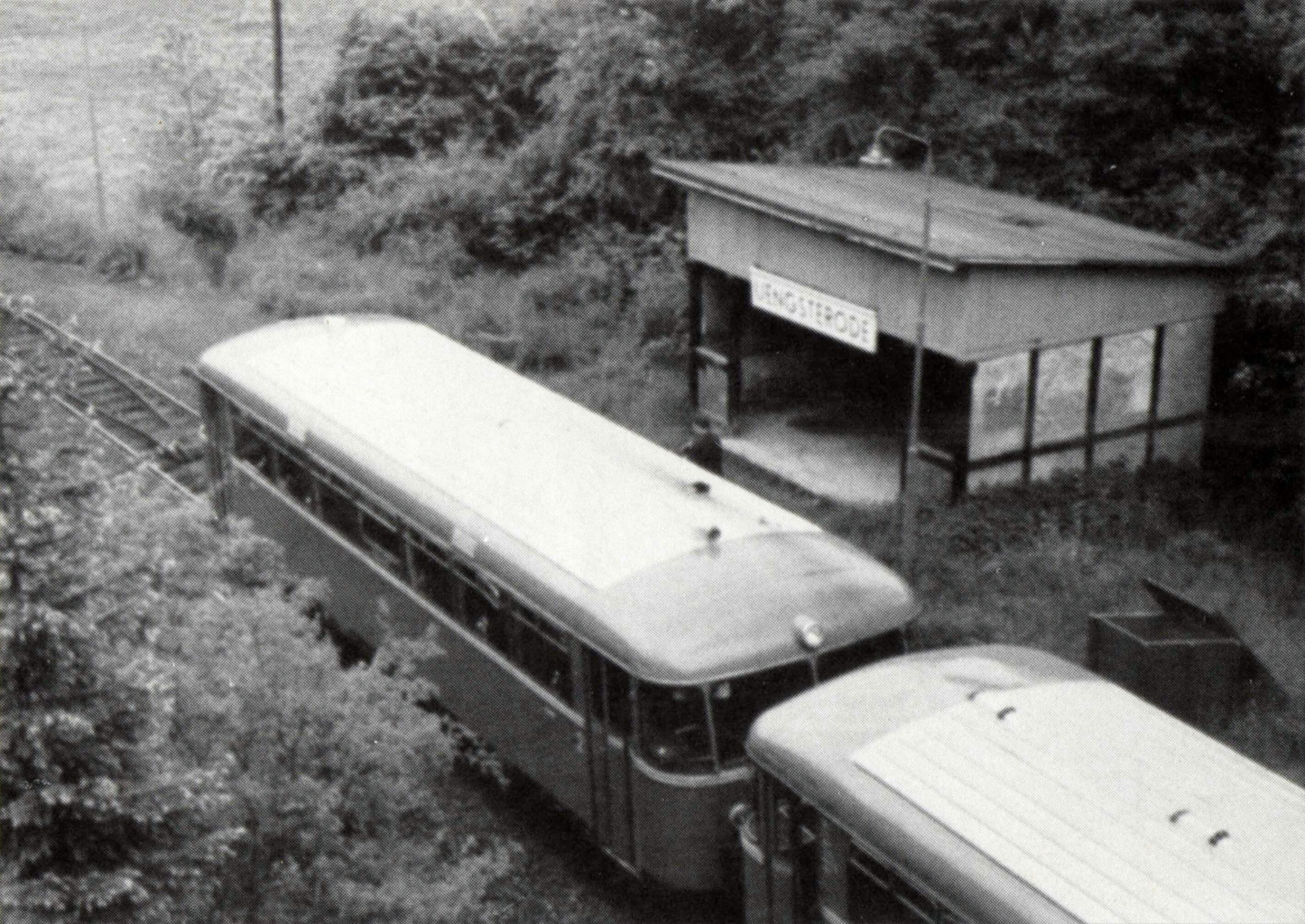 Uengsterode - ehem. Haltepunkt